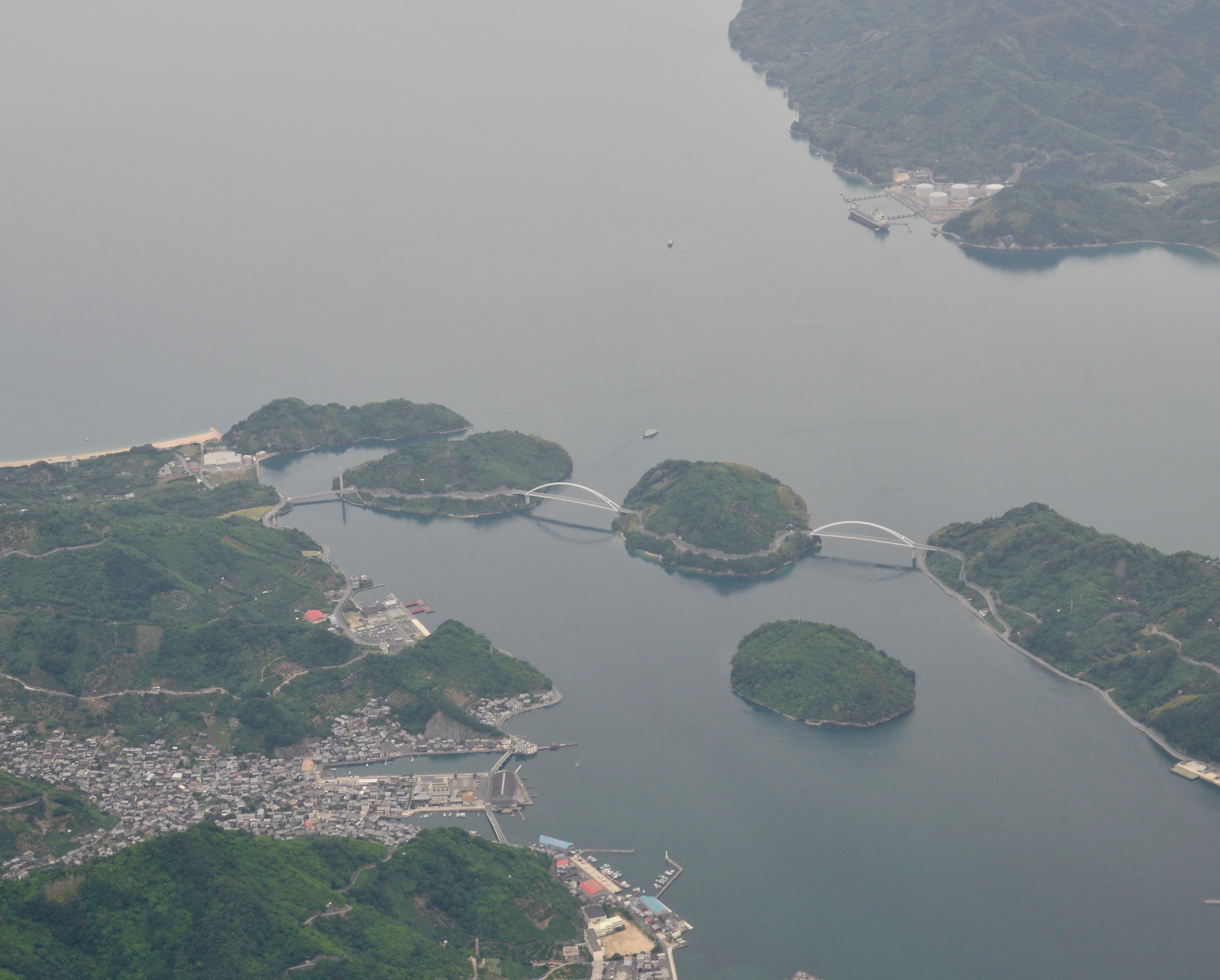 安芸灘オレンジライン。左から大崎下島、平羅島、中ノ島、岡村島